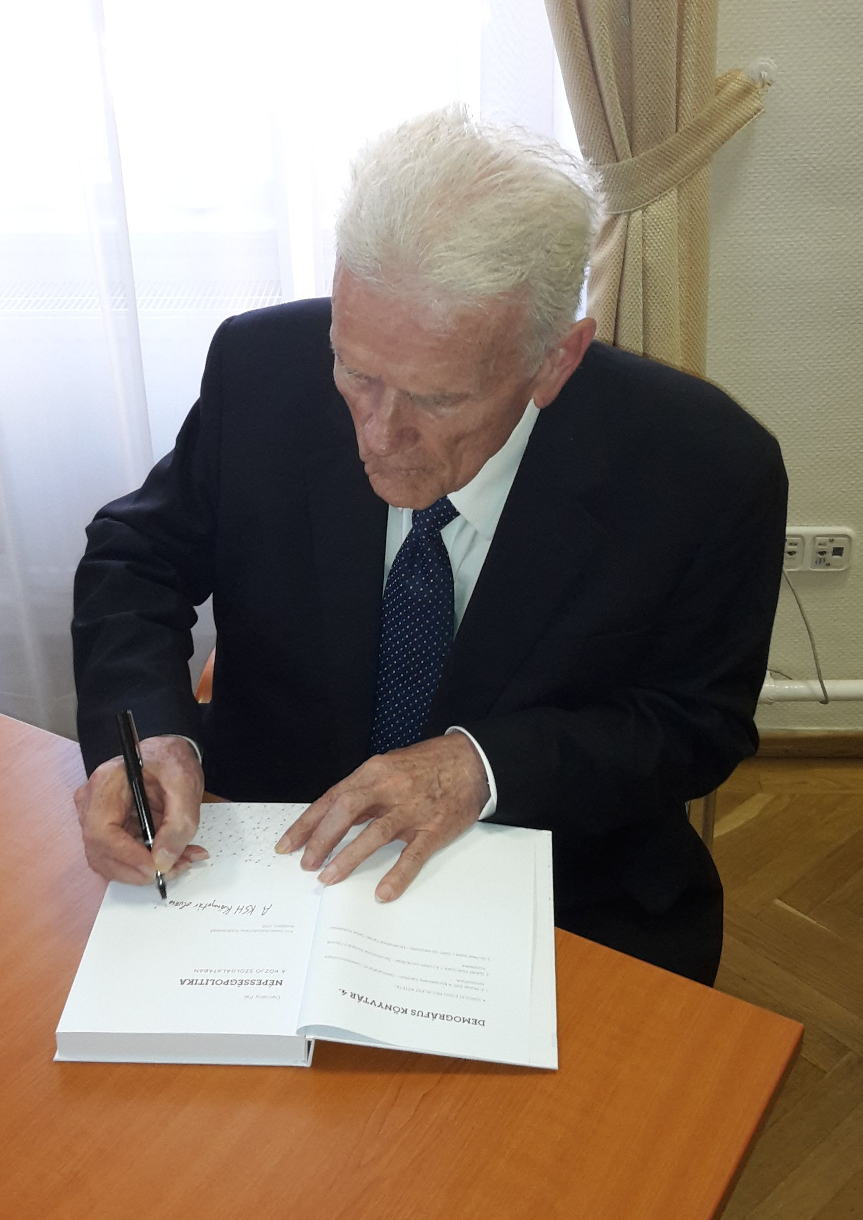 Demény Pál (1932) magyar-amerikai demográfus Népességpolitika a közjó szolgálatában című könyvének bemutatóján